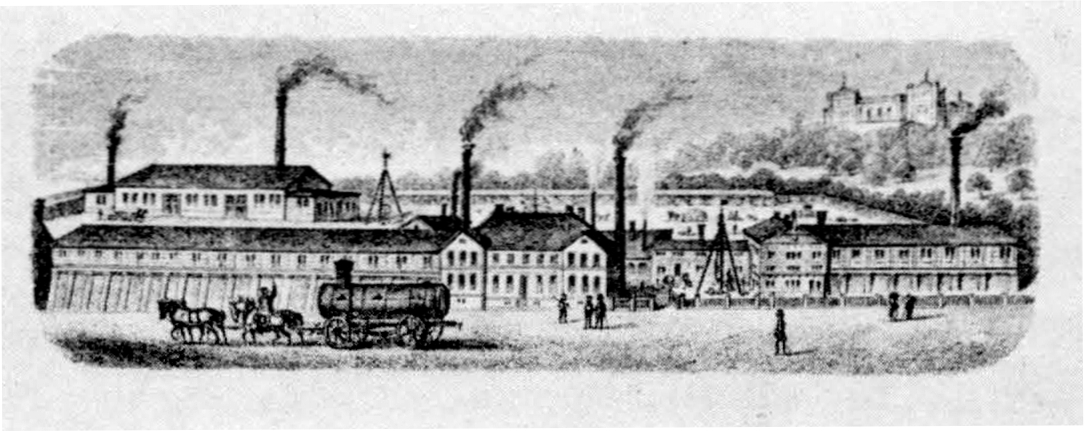 Werksgebäude der Eisengießerei G. Kuhn, Briefkopf, 1861. Oben rechts: Villa Berg.